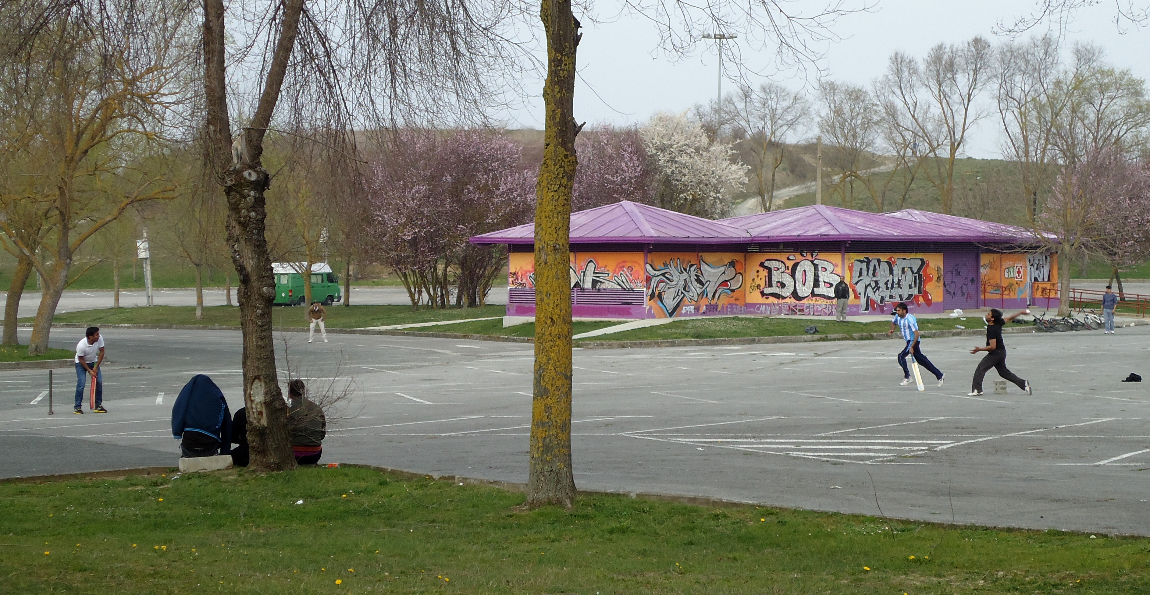 Gazteak kriketean jokatzen Mendizabala aparkalekuan (Gasteiz)